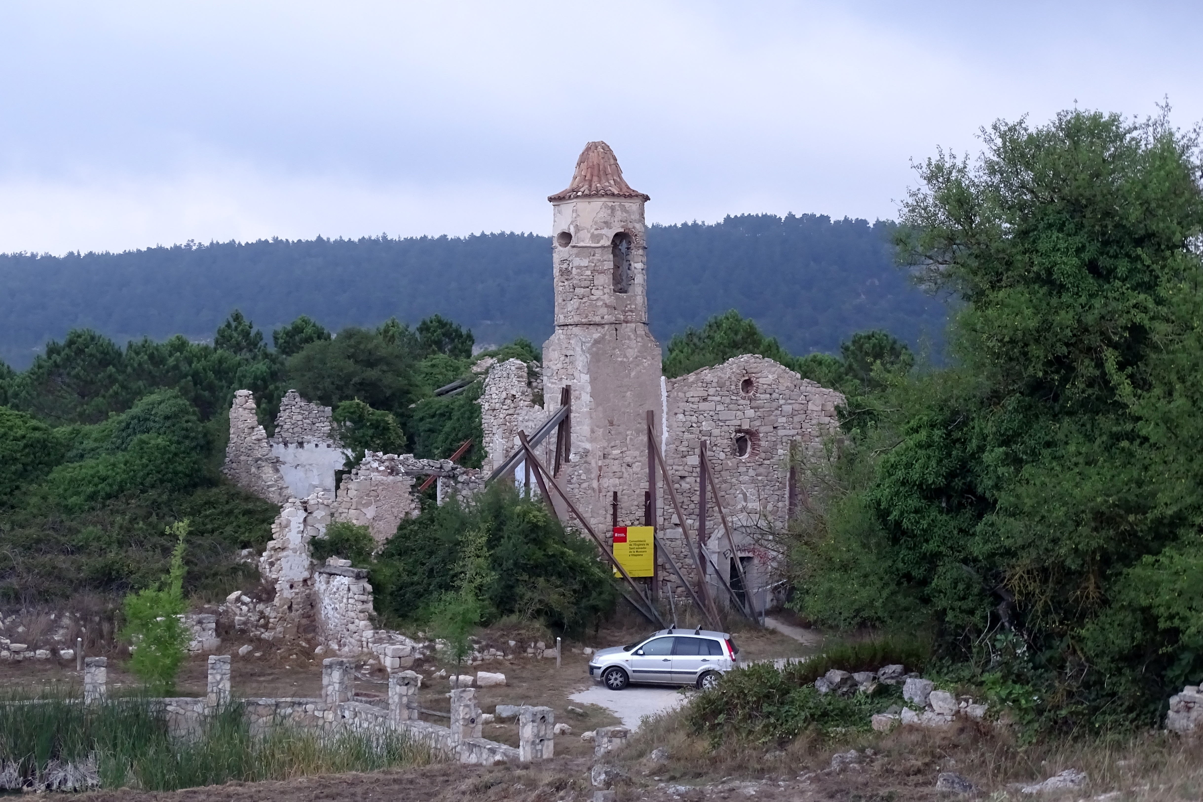 La Mussara